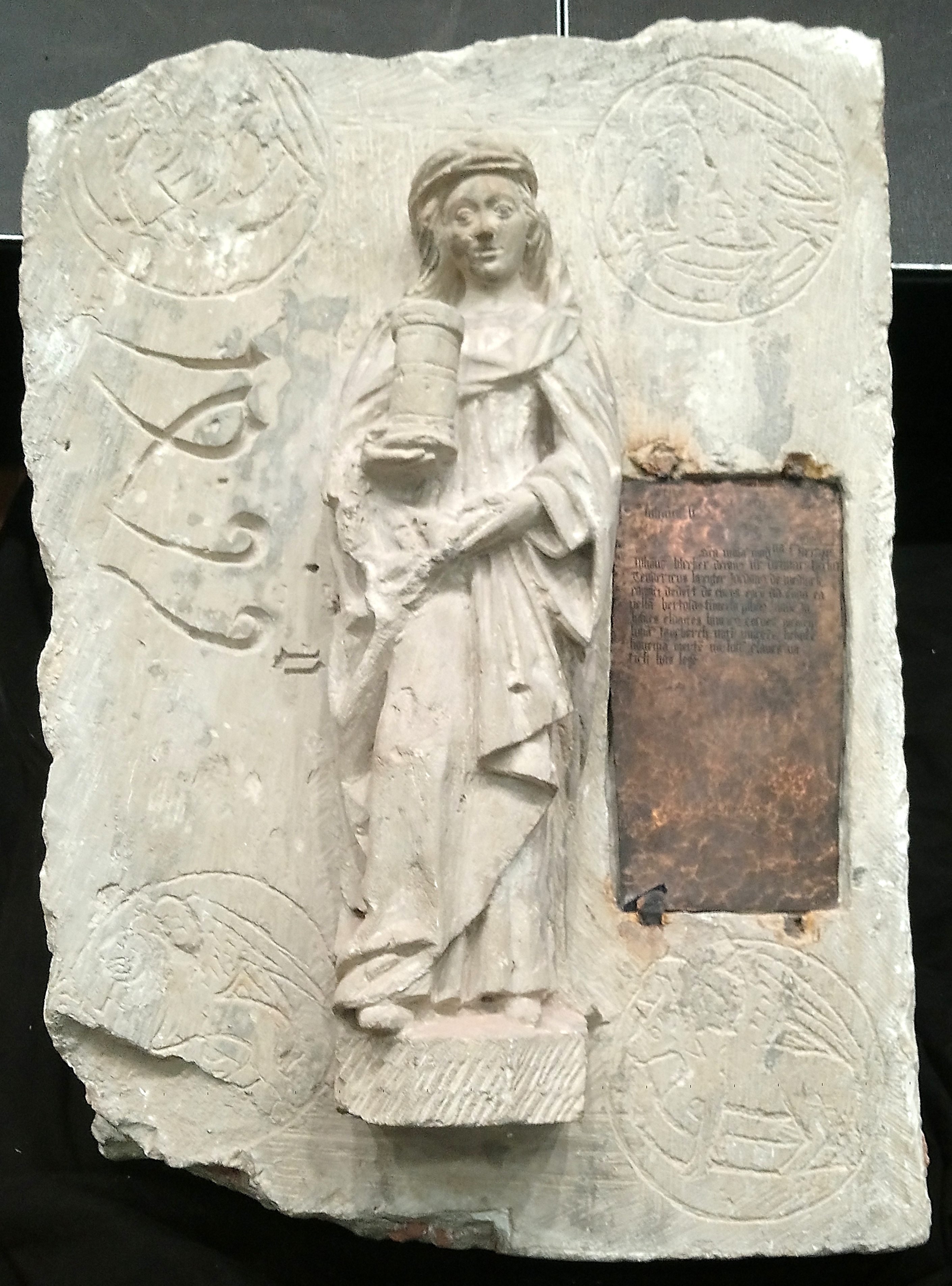 Braunschweig, Maria-Magdalenen-Kapelle: Grundstein von 1499 mit halbplastisch aus dem Stein herausgearbeiteter Statue der Maria Magdalena und einer eingelassenen Kupferplatte mit Informationen zu den Stiftern.